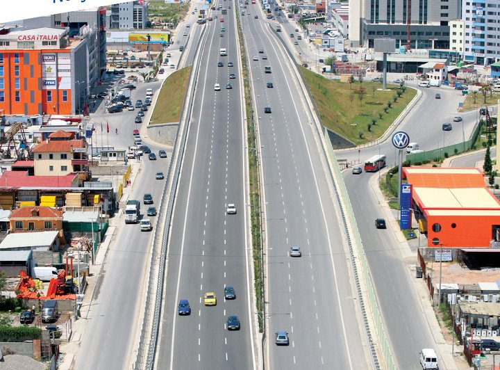 Autobahn zwischen Durres und Tirana